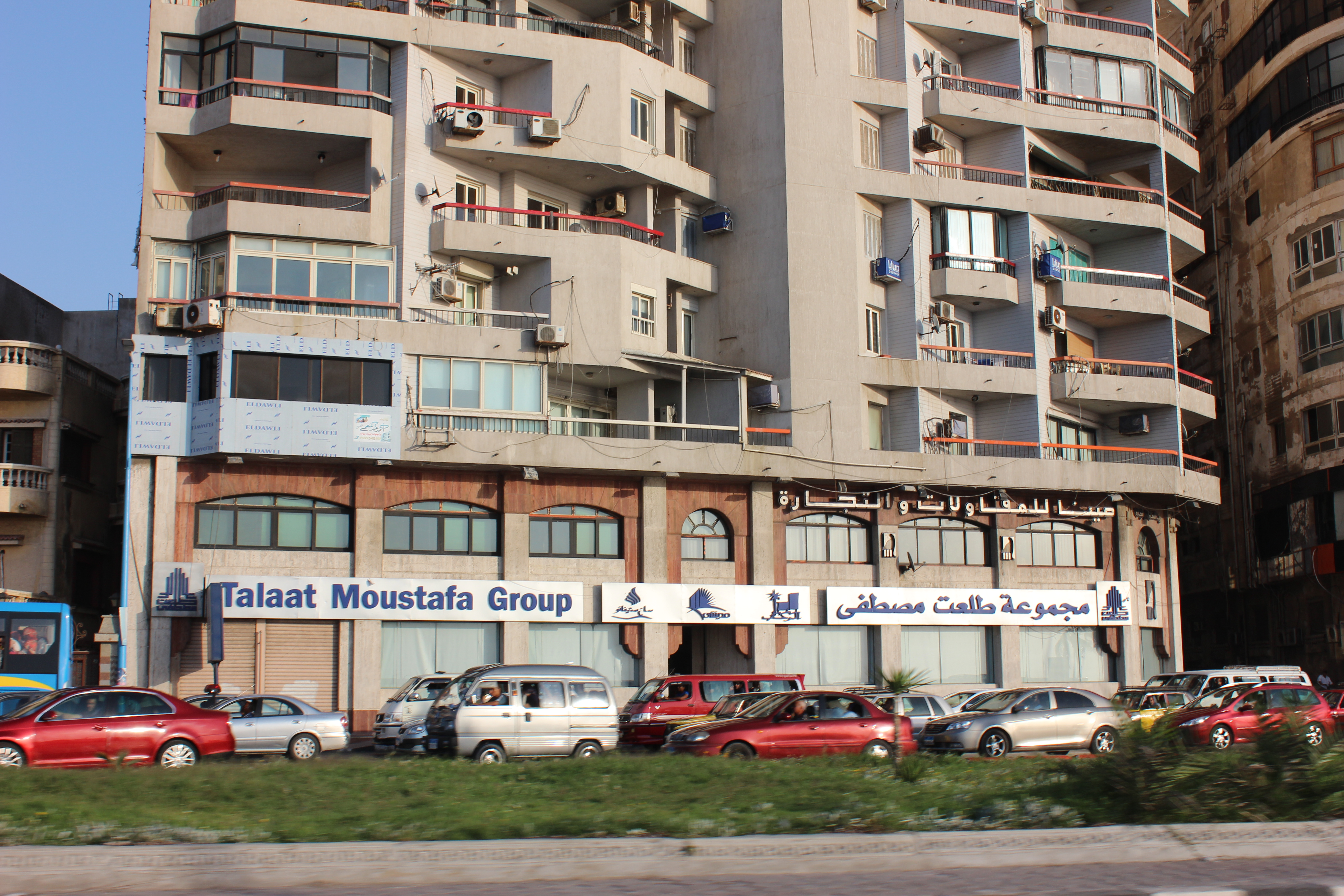 مباني الإسكندرية وبعض العلامات المميزة.